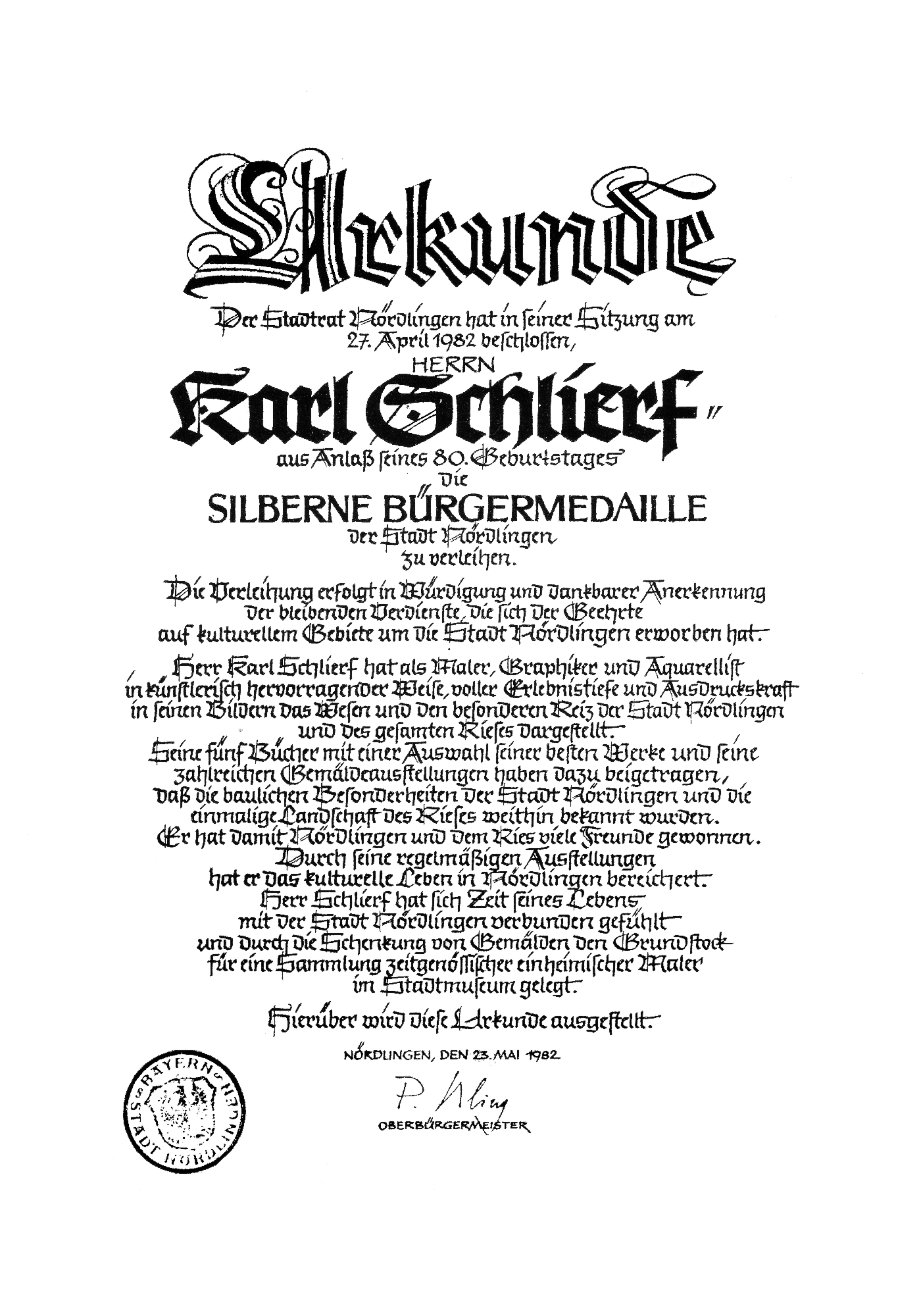 Original-Urkunde über die Silberne Bürgermedaille der Stadt Nördlingen für Karl Schlierf